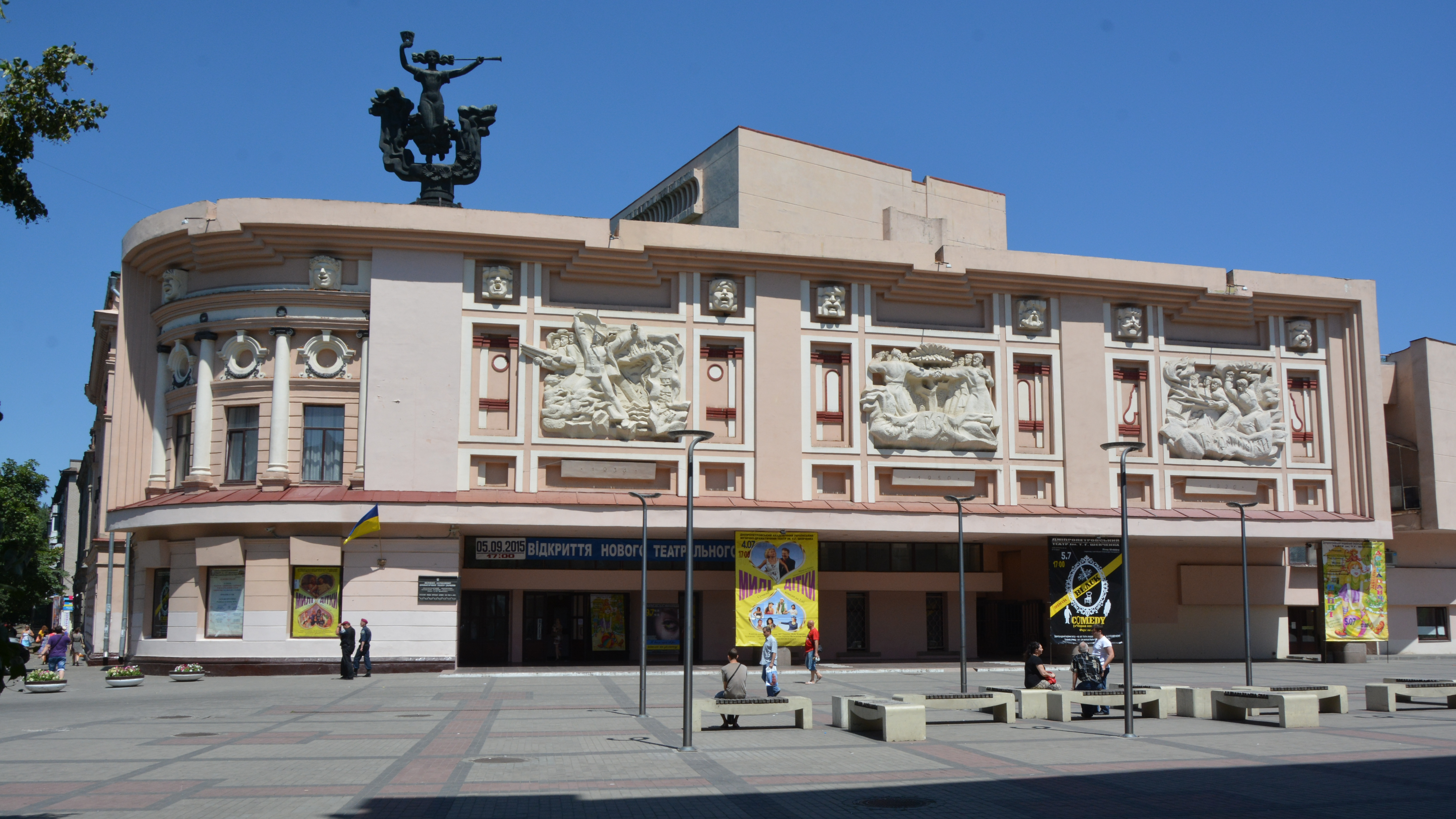 Будинок Театрально-концертного залу (мур.), Дніпропетровськ, Леніна вул., 5